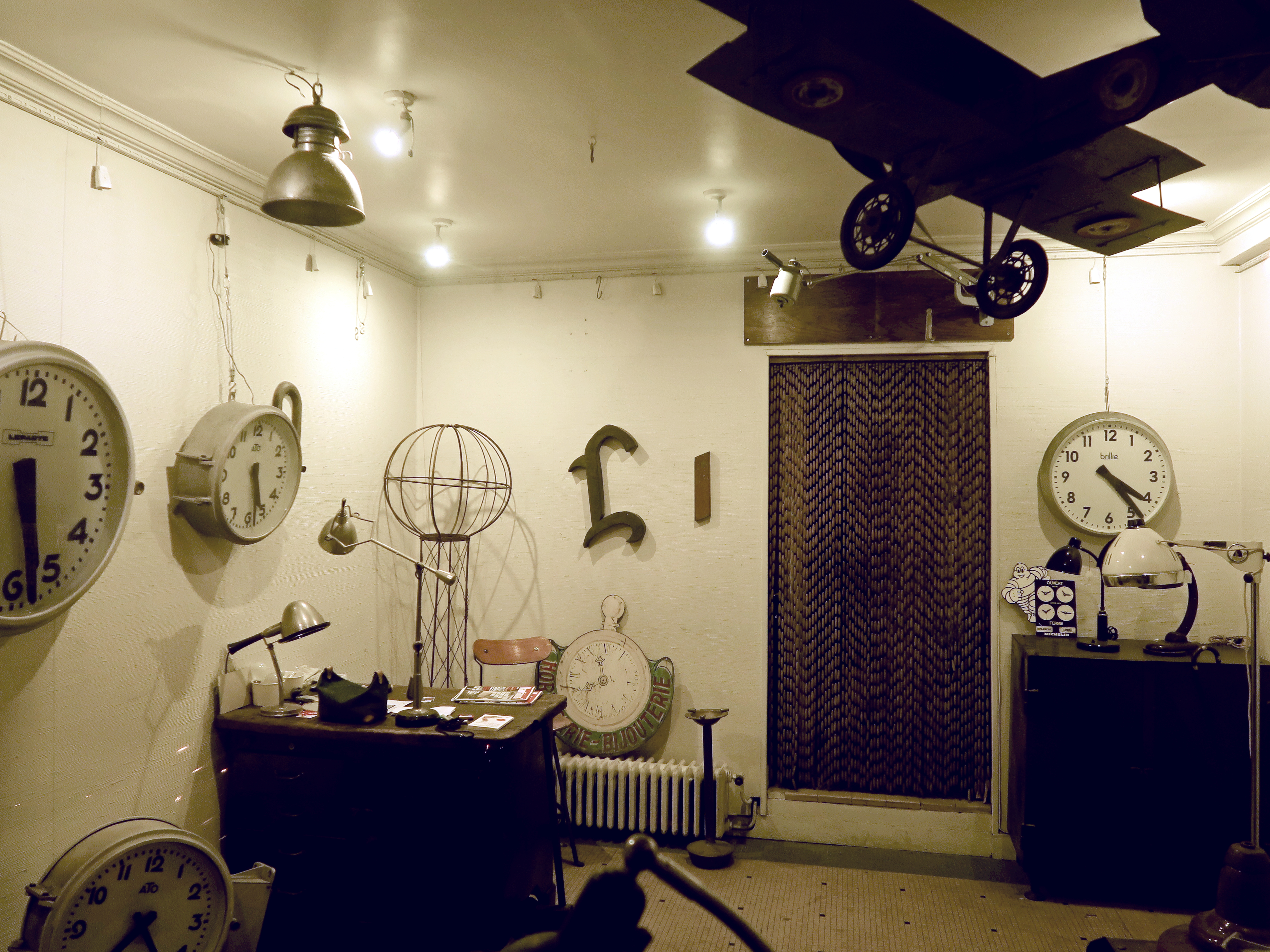 Paris (Île-de-France, France) - "Zut!", magasin d'antiquités industrielles, 9 rue Ravignan.